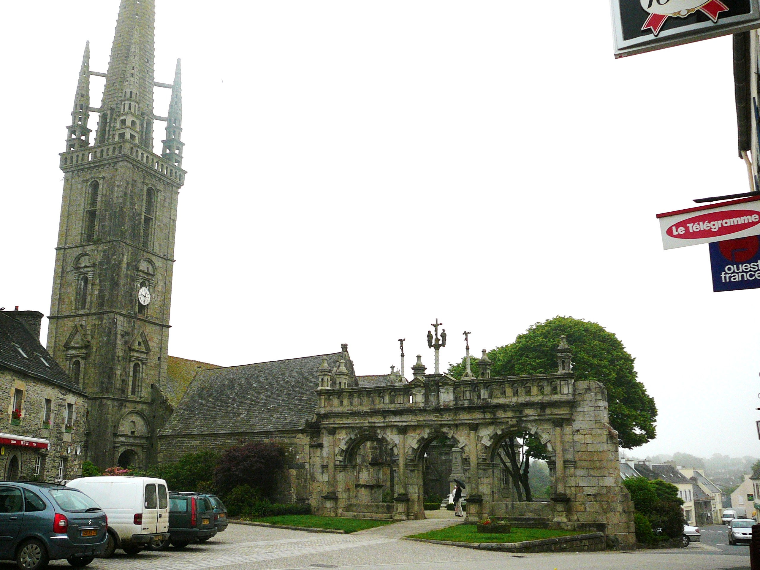 Sizun: Arc de triomphe et l'église vus de la rue